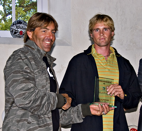 Antoine Albeau, champion du monde de funboard, remet à Florent Renard, champion de France de funboard, le trophée "Sportif Rétais 2008" pour ses résultats. Saint-Martin-de-Ré - Île de Ré - 06/2008